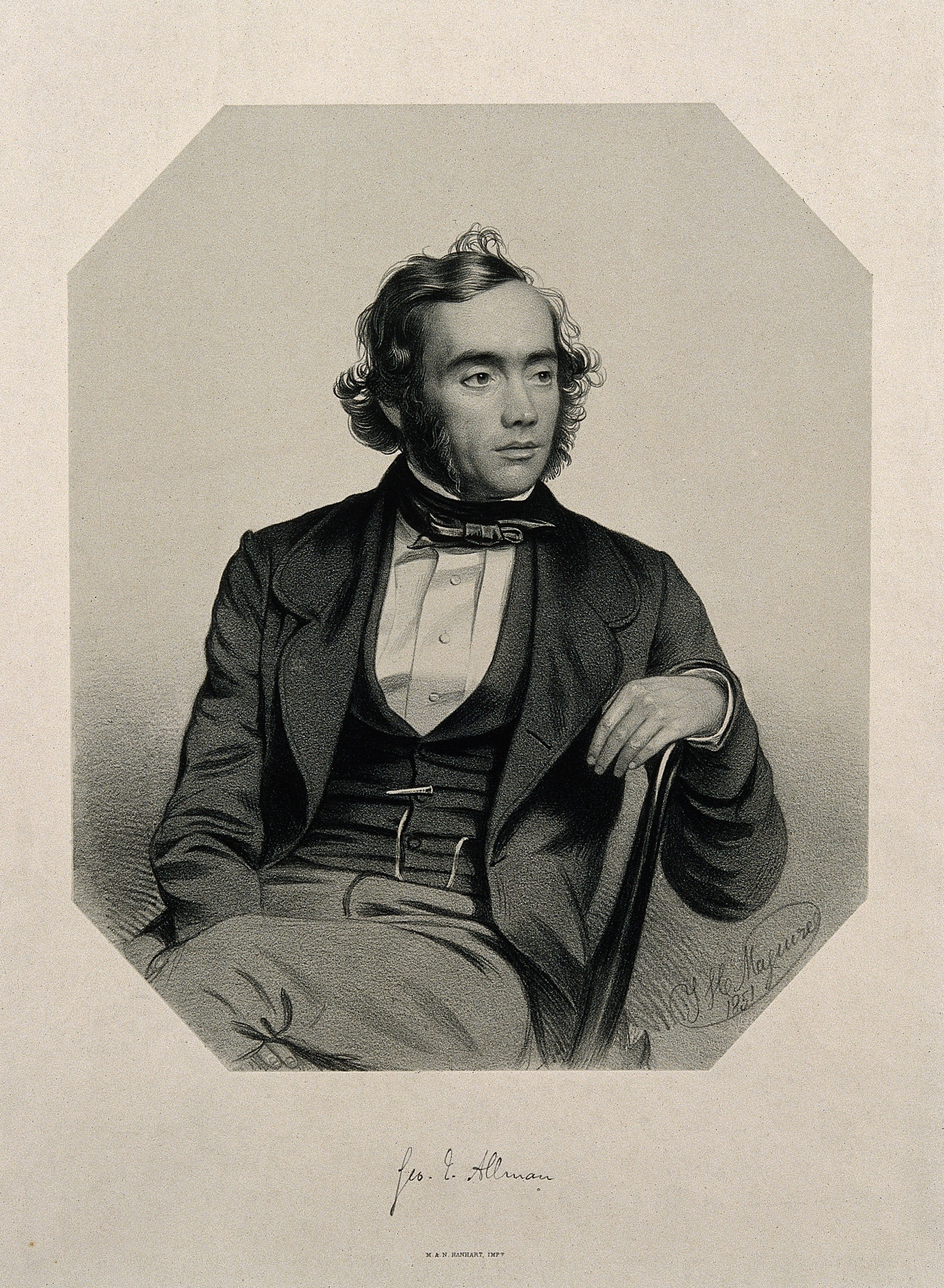 Genre/Technique: Portrait prints. Lithographs. Subject name: Allman, George James, 1812-1898.